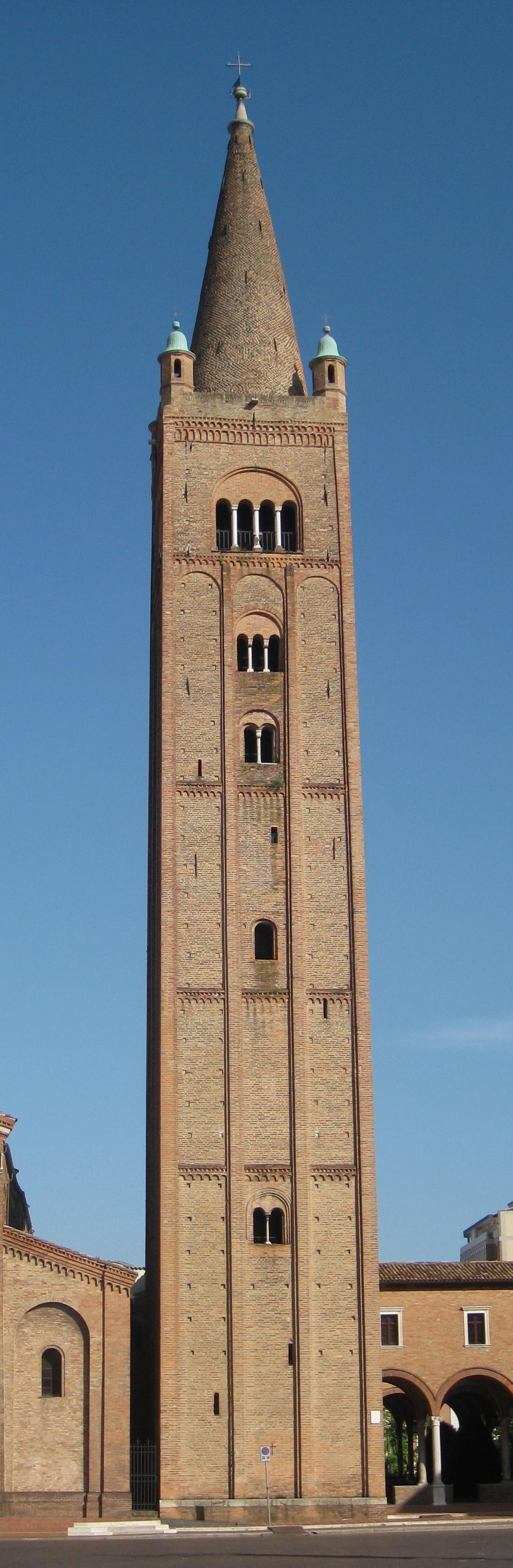 Campanile dell'Abbazia di San Mercuriale.